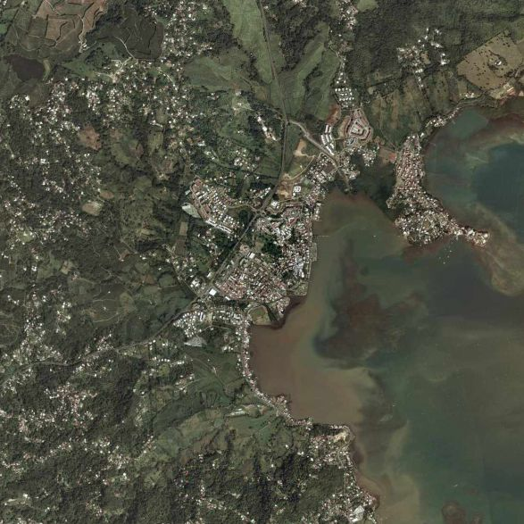 la commune du Le Robert (97231) en Martinique (France).